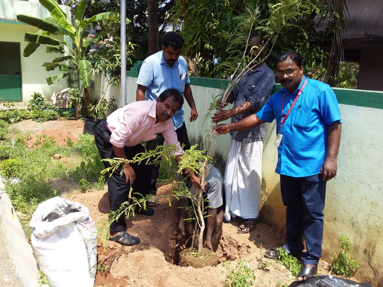 സ്കൂള്‍ ഹെഡ് മാസ്റ്റര്‍ ശ്രീ സുരേഷ്‌ ബാബു സെക്രട്ടേറിയറ്റ്‌ സൂപ്രവൈസര്‍ ശ്രീ വലിയമല സുരേഷ്‌ പരിസ്ഥിതി പ്രവര്‍ത്തകര്‍ അനീഷ്‌ നെല്ലിക്കല്‍( Anish nellickal ), നാസര്‍ വെളിയംകോട്(Nasar veliyancode) എന്നിവര്‍ ഗവ. മോഡൽ ബോയ്സ് എച്ച്.എസ്.എസ്, തൈക്കാട് അങ്കണത്തില്‍ നെല്ലി മരം നടുന്നു.